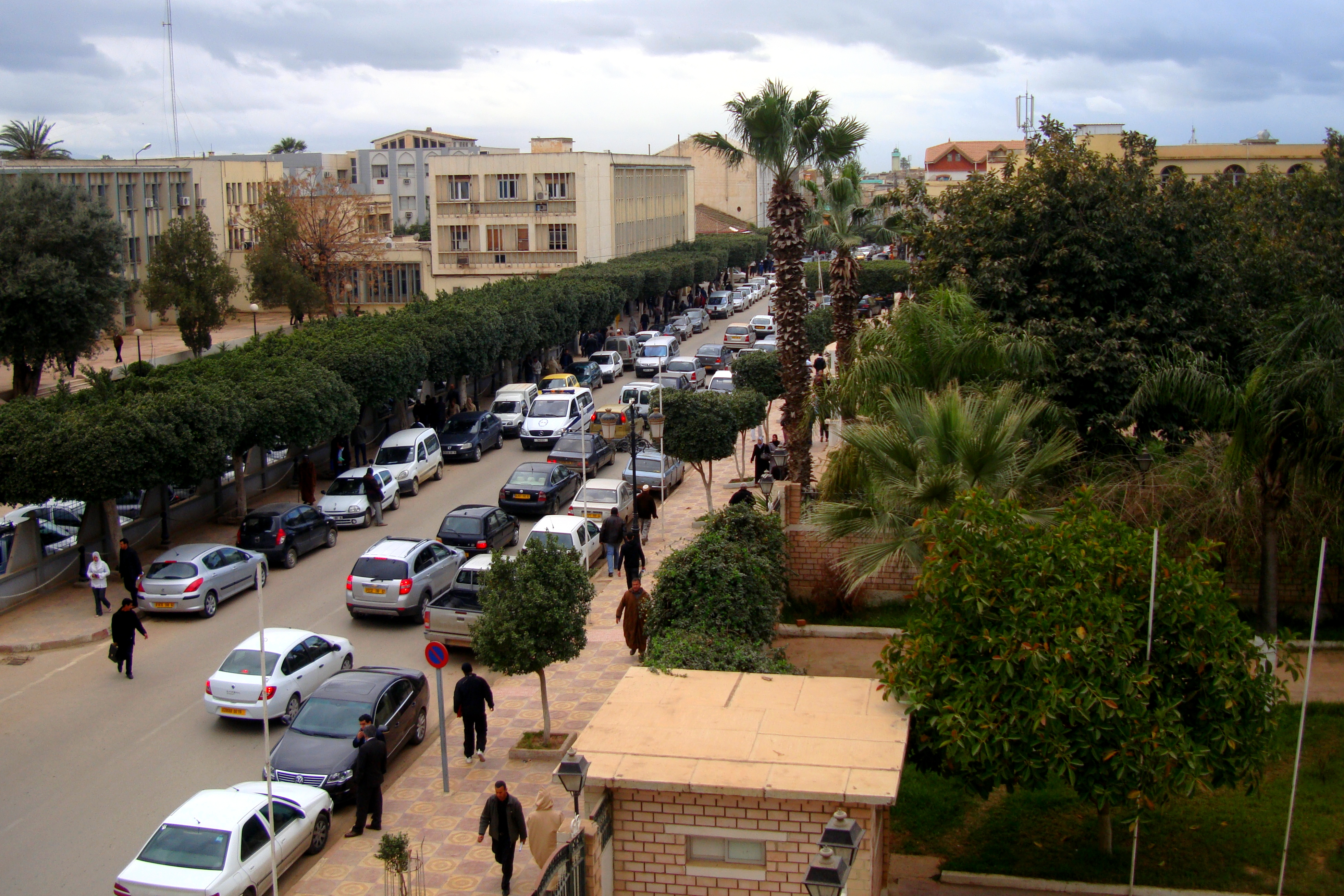 Siège de la Wilaya de Chlef (Cité administrative)